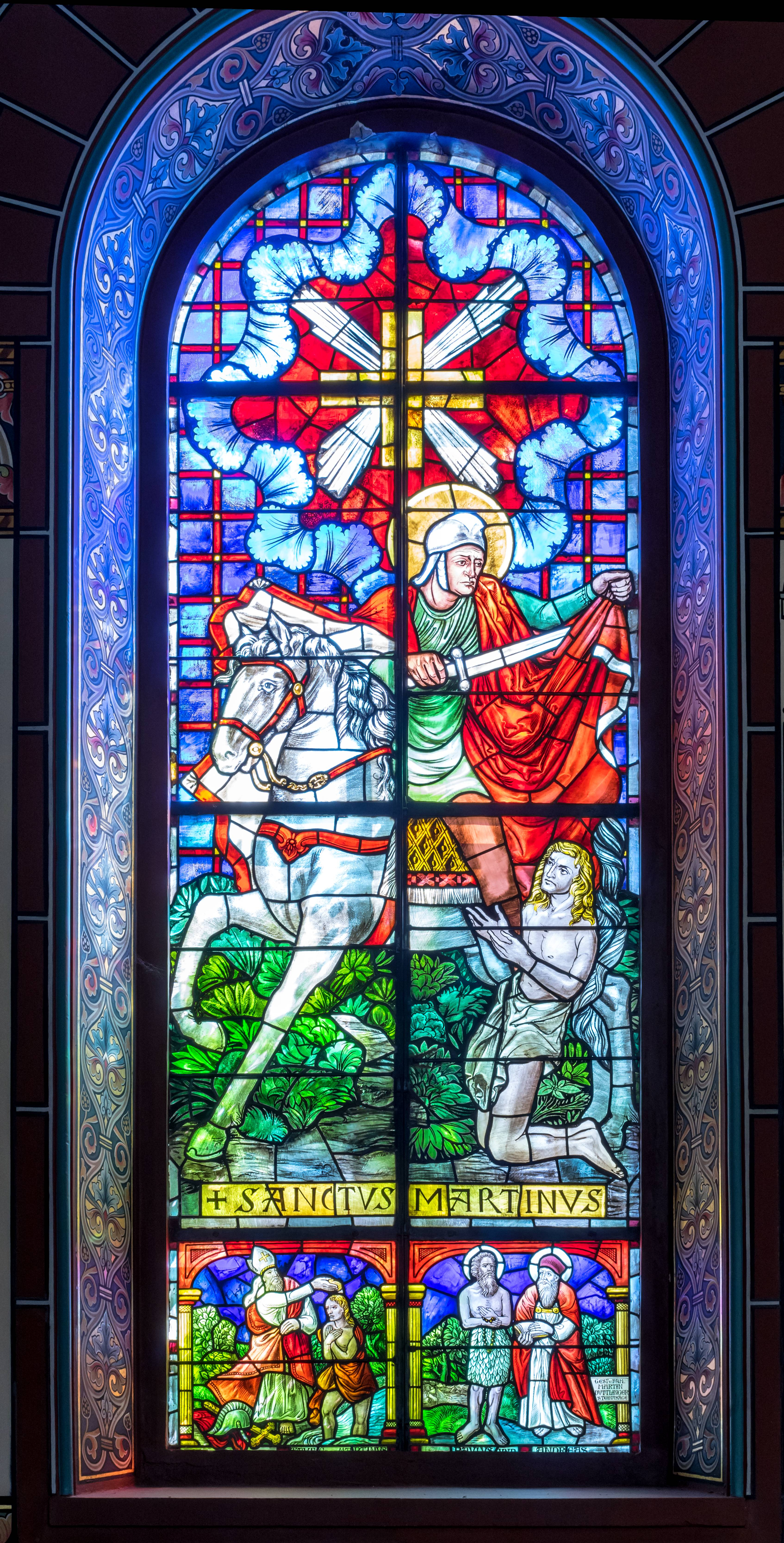 St. Peter und Paul in Bonndorf Die Glasfenster im Langhaus in der Kirche